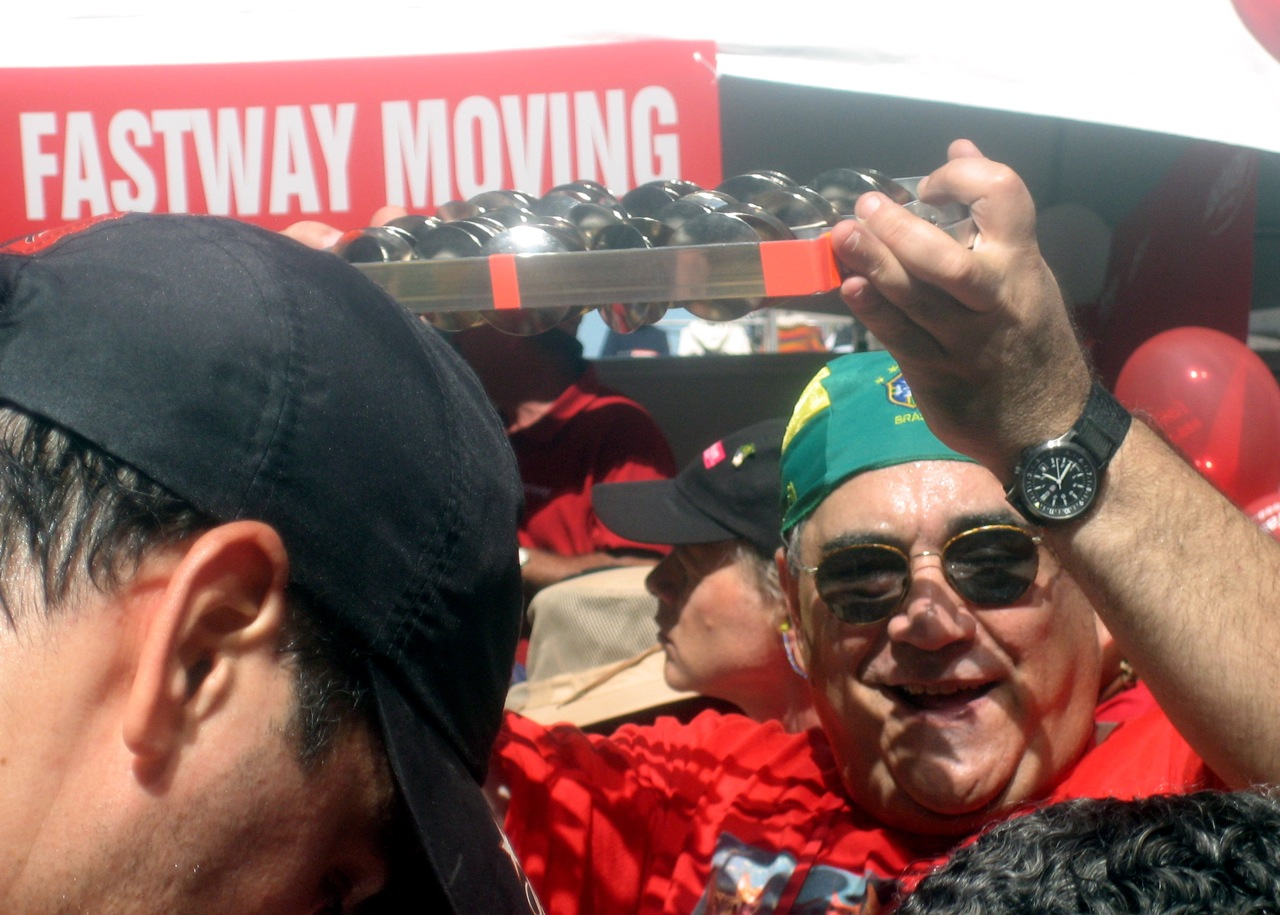 Mann schüttelt Chocalho.